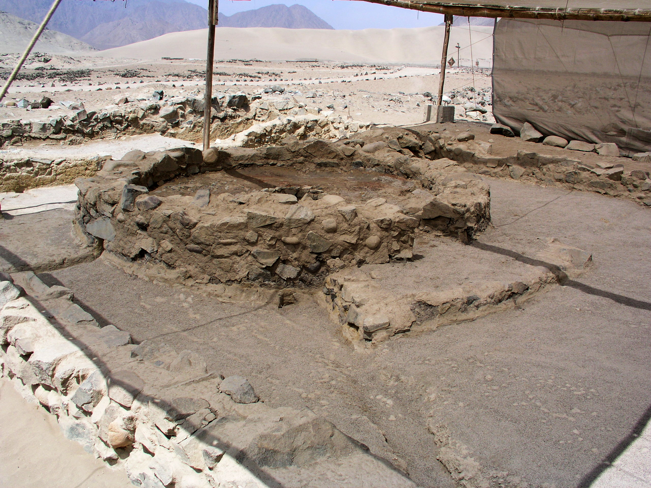 Pirámides en Caral, Valle de Supe, Region Lima, Peru. Altar del Fuego Sagrado, on top of the Temple Mayor.